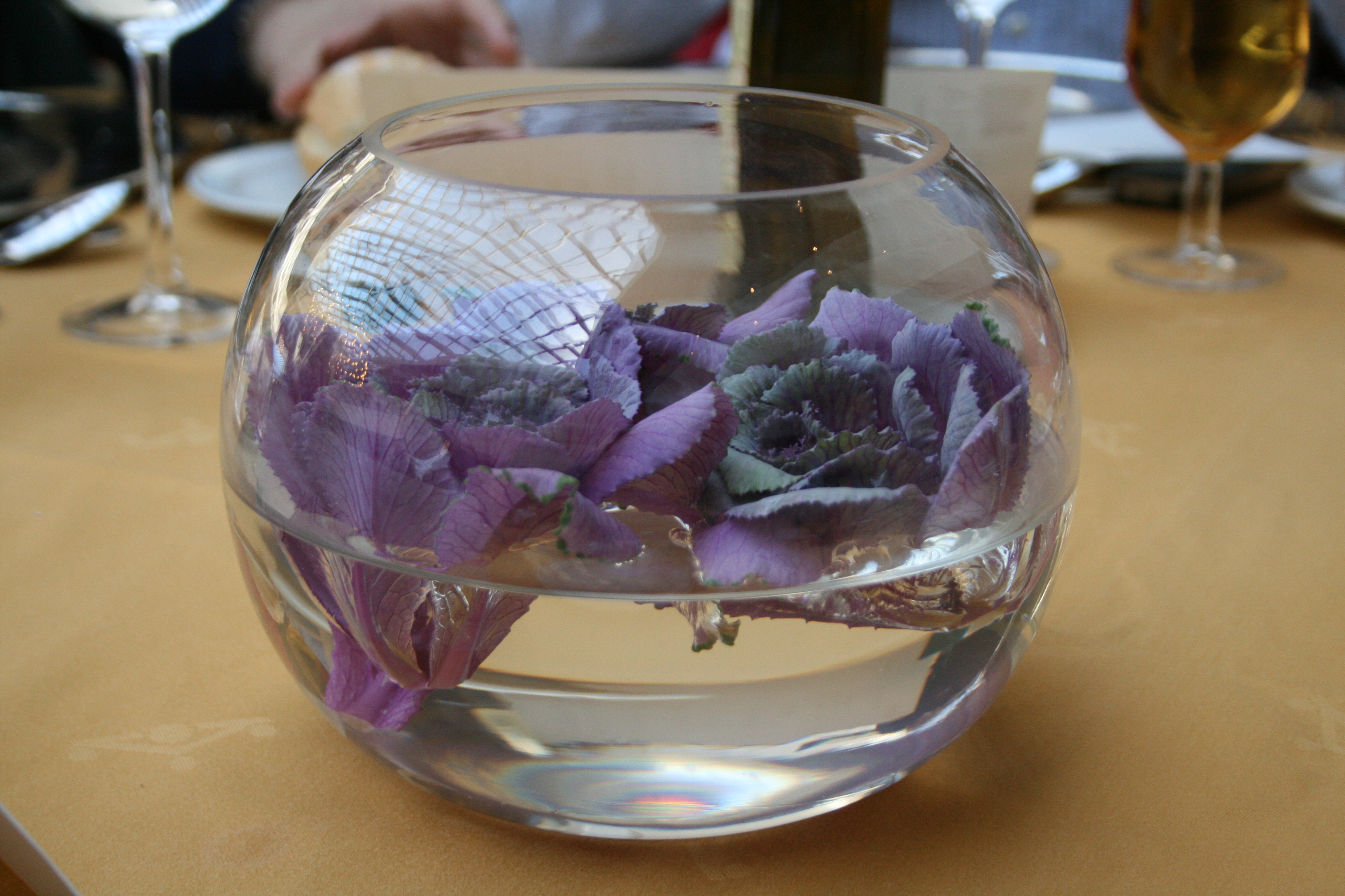 Decoración de mesa consistente en una col roja metida en agua